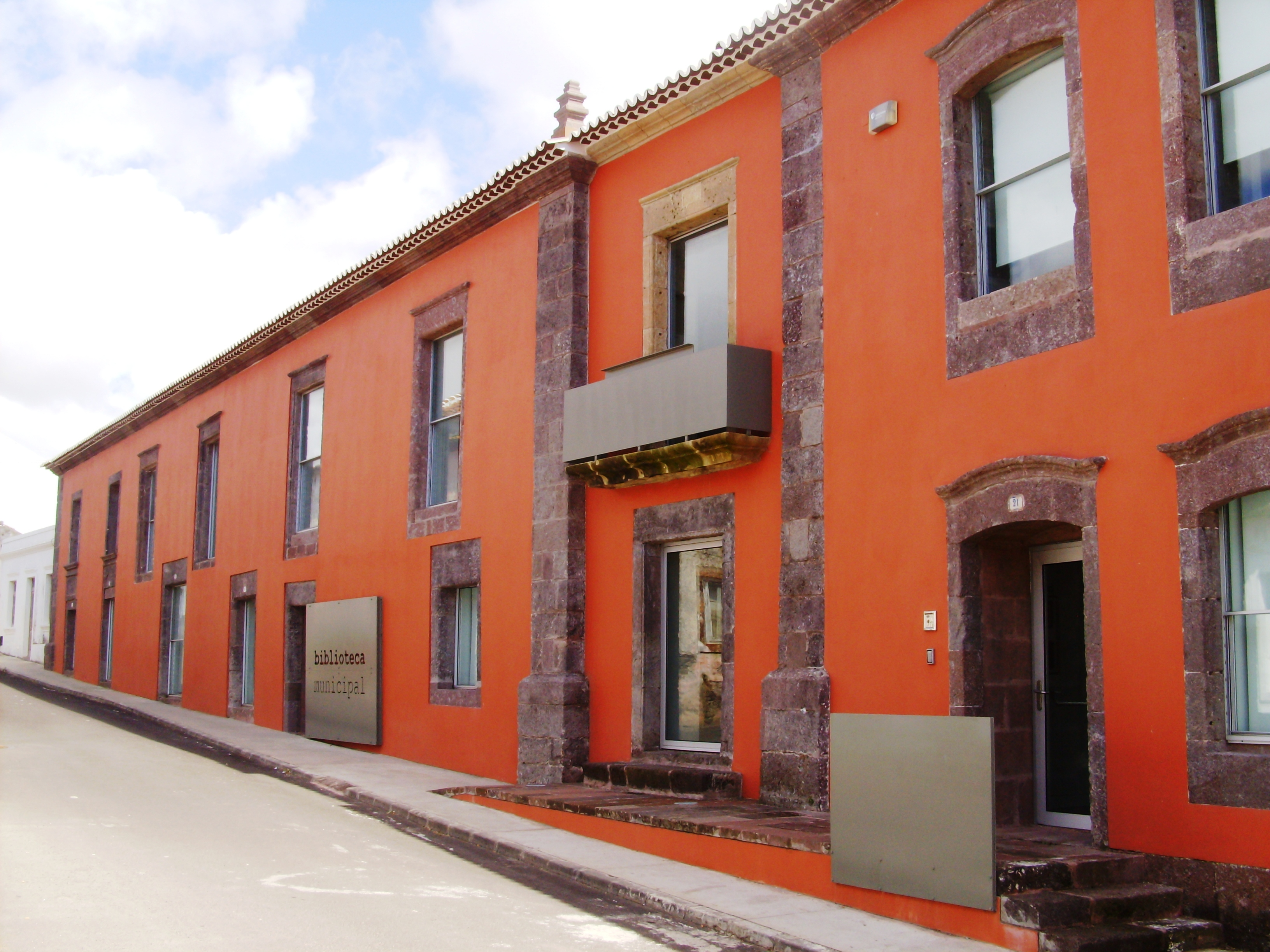 Biblioteca Pública Municipal, Vila do Porto, Ilha de Santa Maria, Açores.